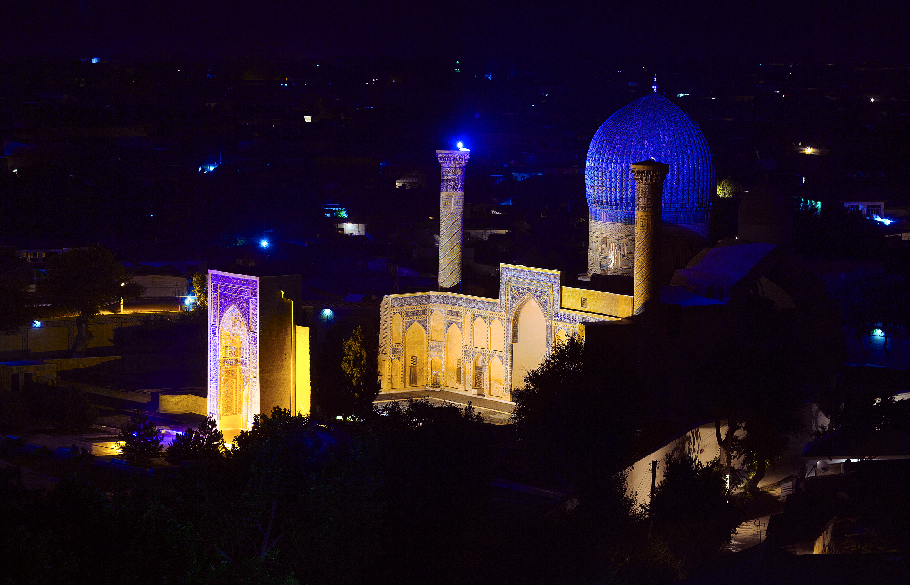 Гур-Эмир - Amir Temur maqbarasi - Gur-e-Amir Uzbekistan, Samarqand - Узбекистан, Самаркад By: Khusen Rustamov (Хусен Рустамов) Copyright © ART.IRBIS Production